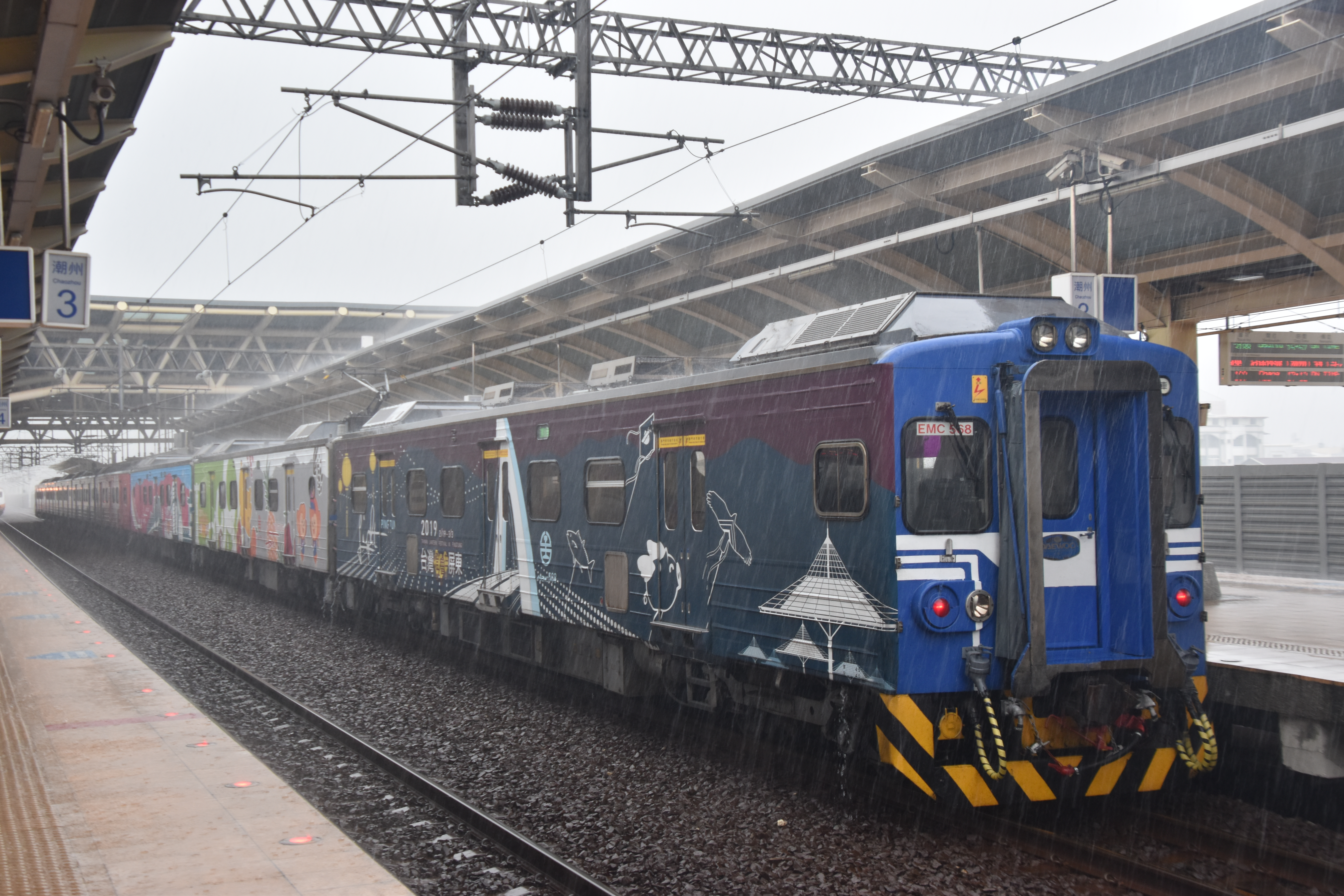 臺灣鐵路管理局EMU500型電聯車內裝優化編組EMU568+565，雨中停靠潮州車站。